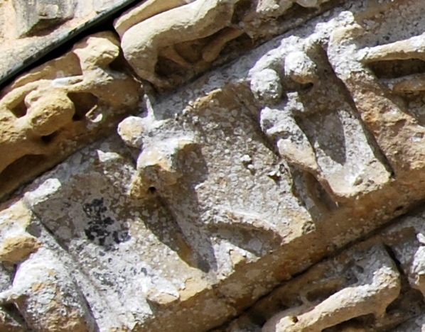 Détails du Zodiaque du Portail